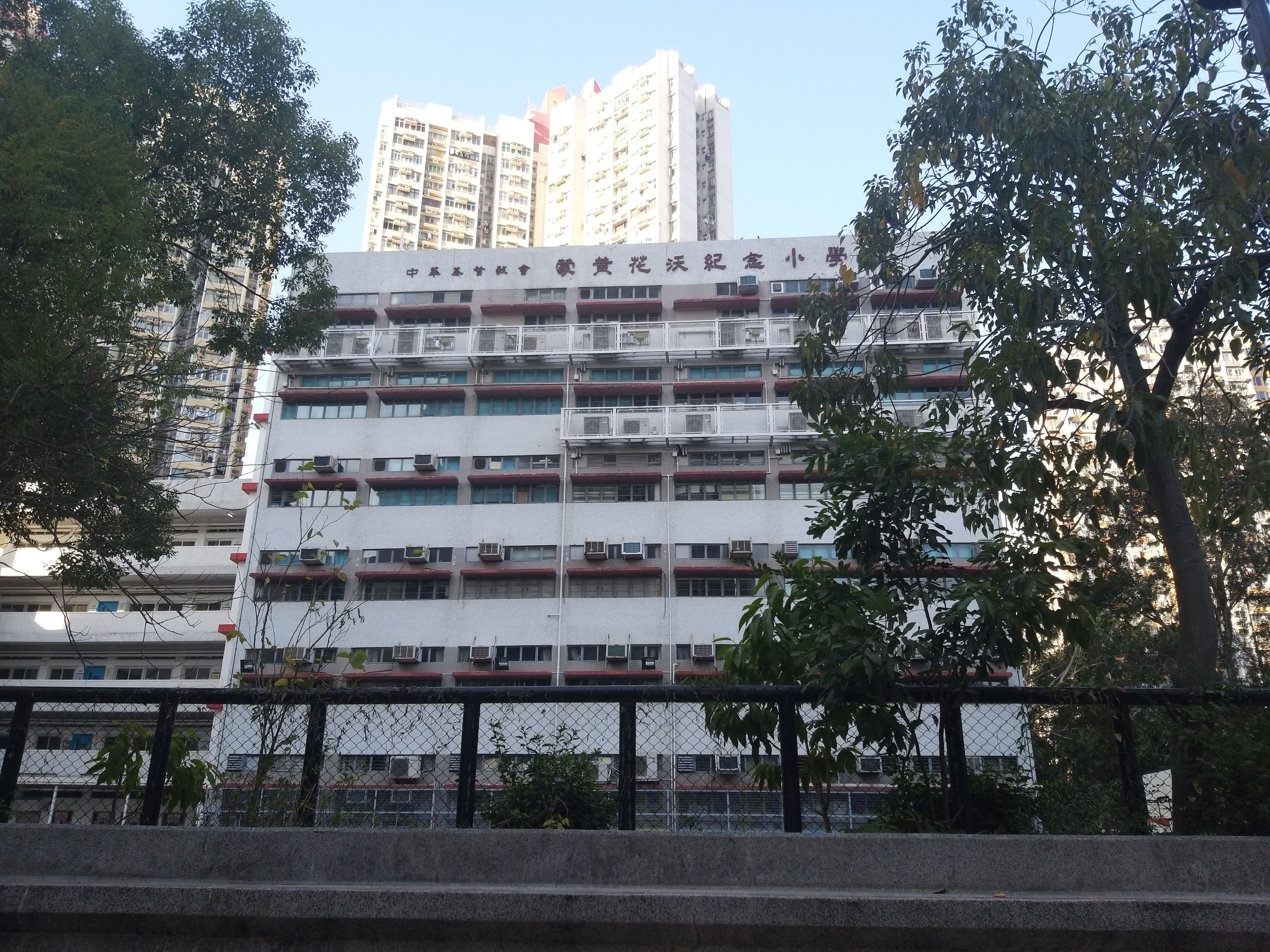 外牆用色與沙田的五育中學相似，另外外牆的通風櫥位置並未拆去